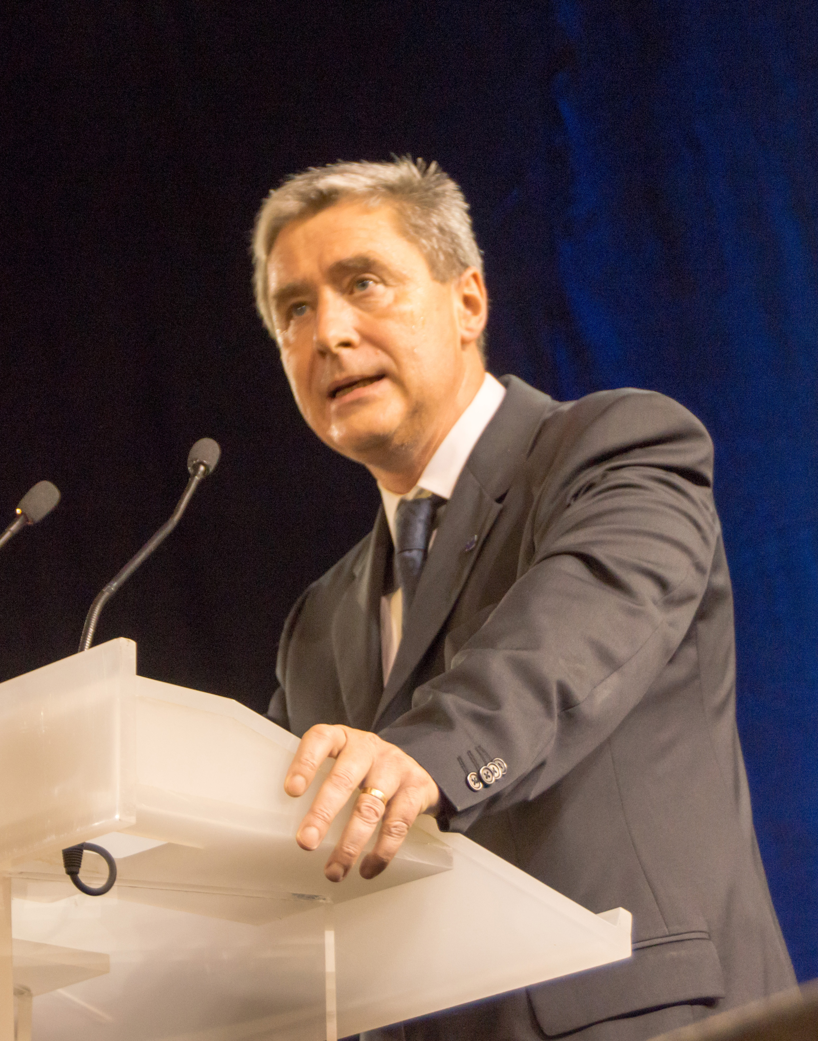 Intervention de Philippe Briand lors d'un meeting de Nicolas Sarkozy à Saint-Cyr-sur-Loire le 15 octobre 2014.